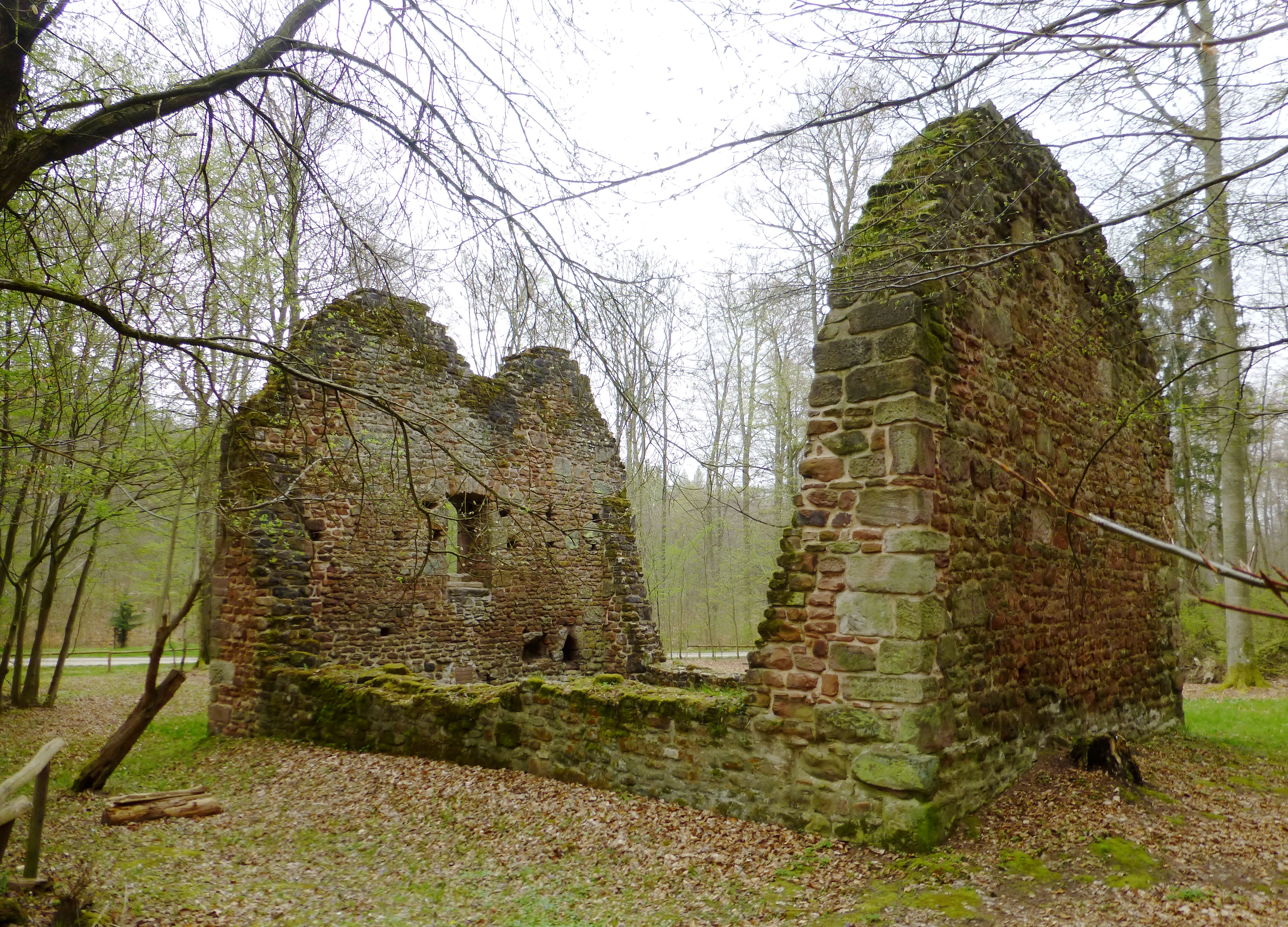 Kirchenruine der Wüstung Leisenberg im Gillersheimer Wald nahe Sudershausen, Südniedersachsen. Erbaut um 1300